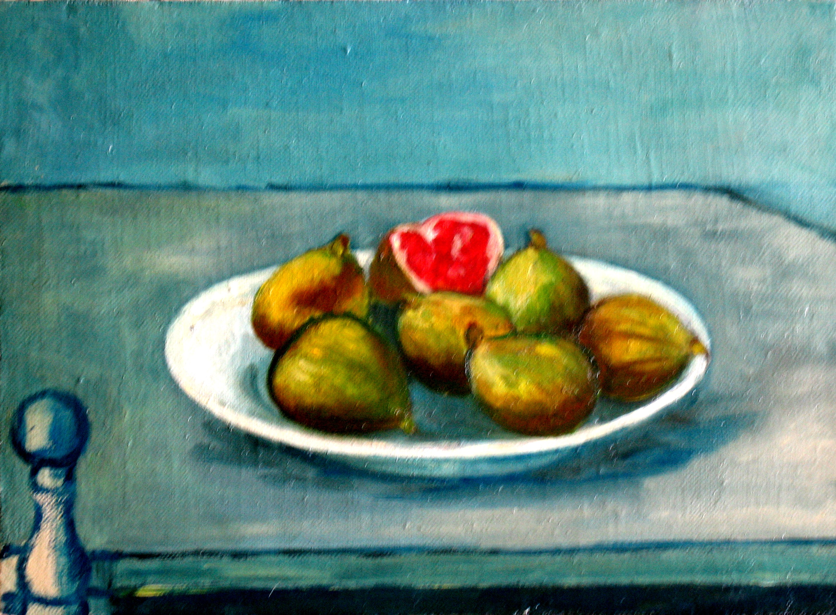 Natura morta - Vassoio di fichi